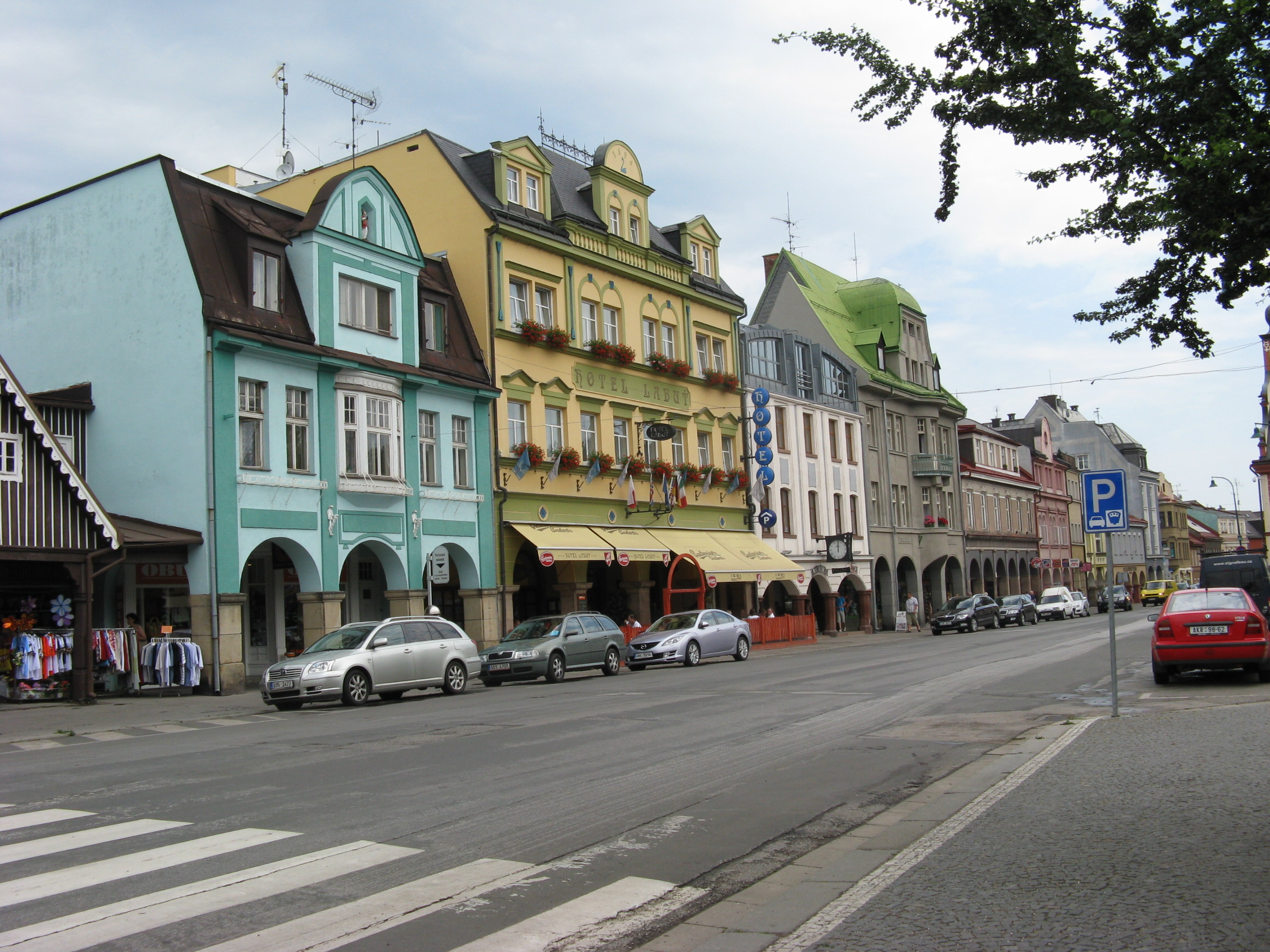 Vrchlabí